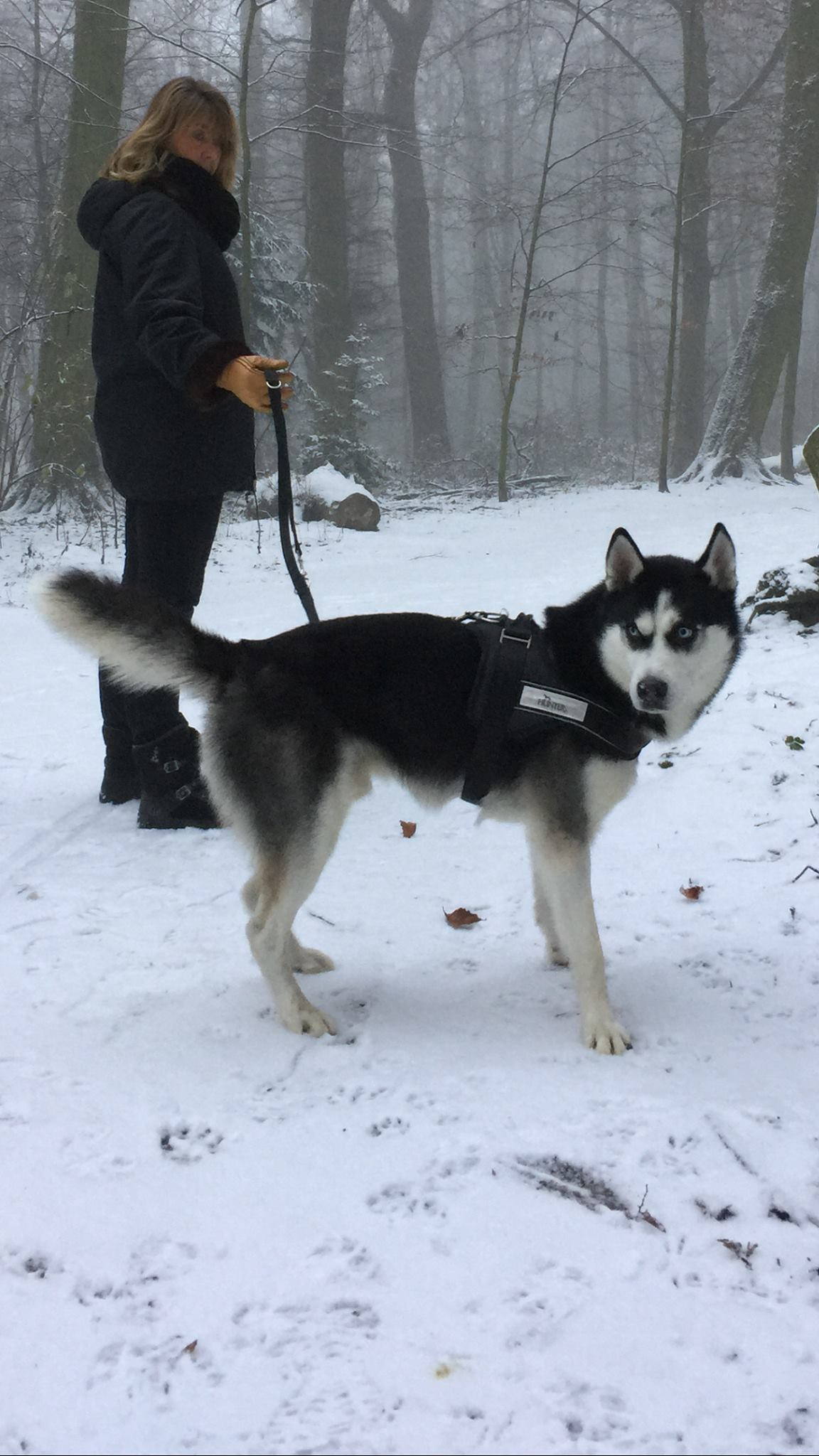 Leïko in snow